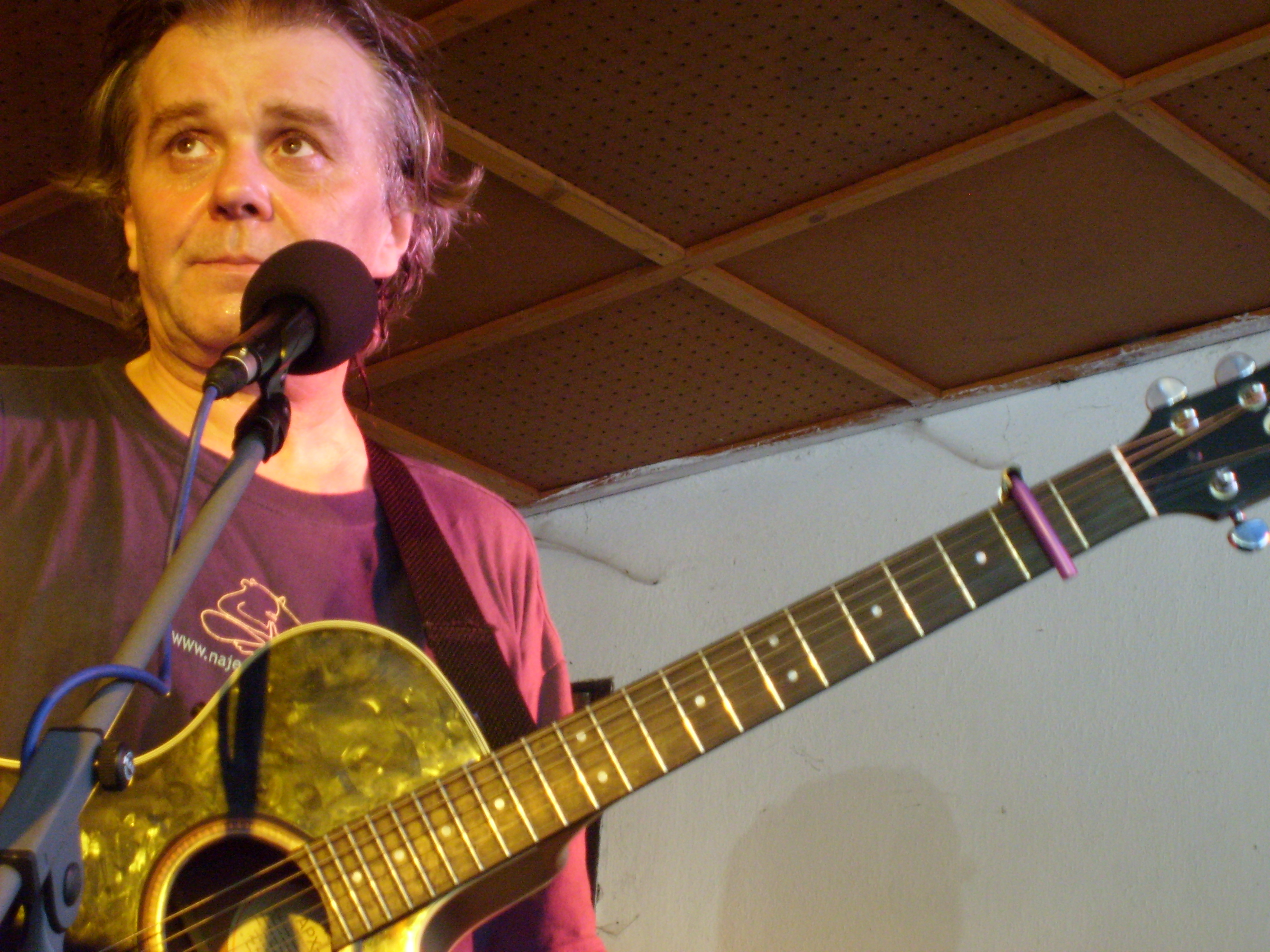 Vlastimil Třešňák, Festival Otevřeno Jimramov 2007